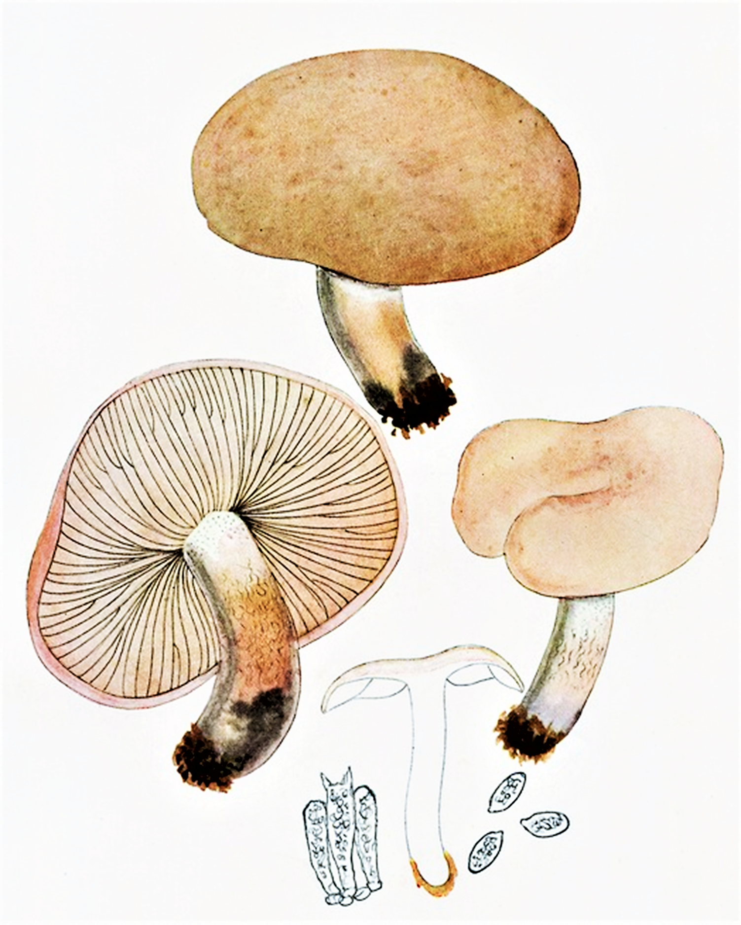 Giacomo Bresadola: Tricholoma irinum (Fr., 1818), heute Lepista irina (Fr.) H.E.Bigelow (1959)